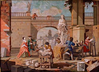 pietra dura